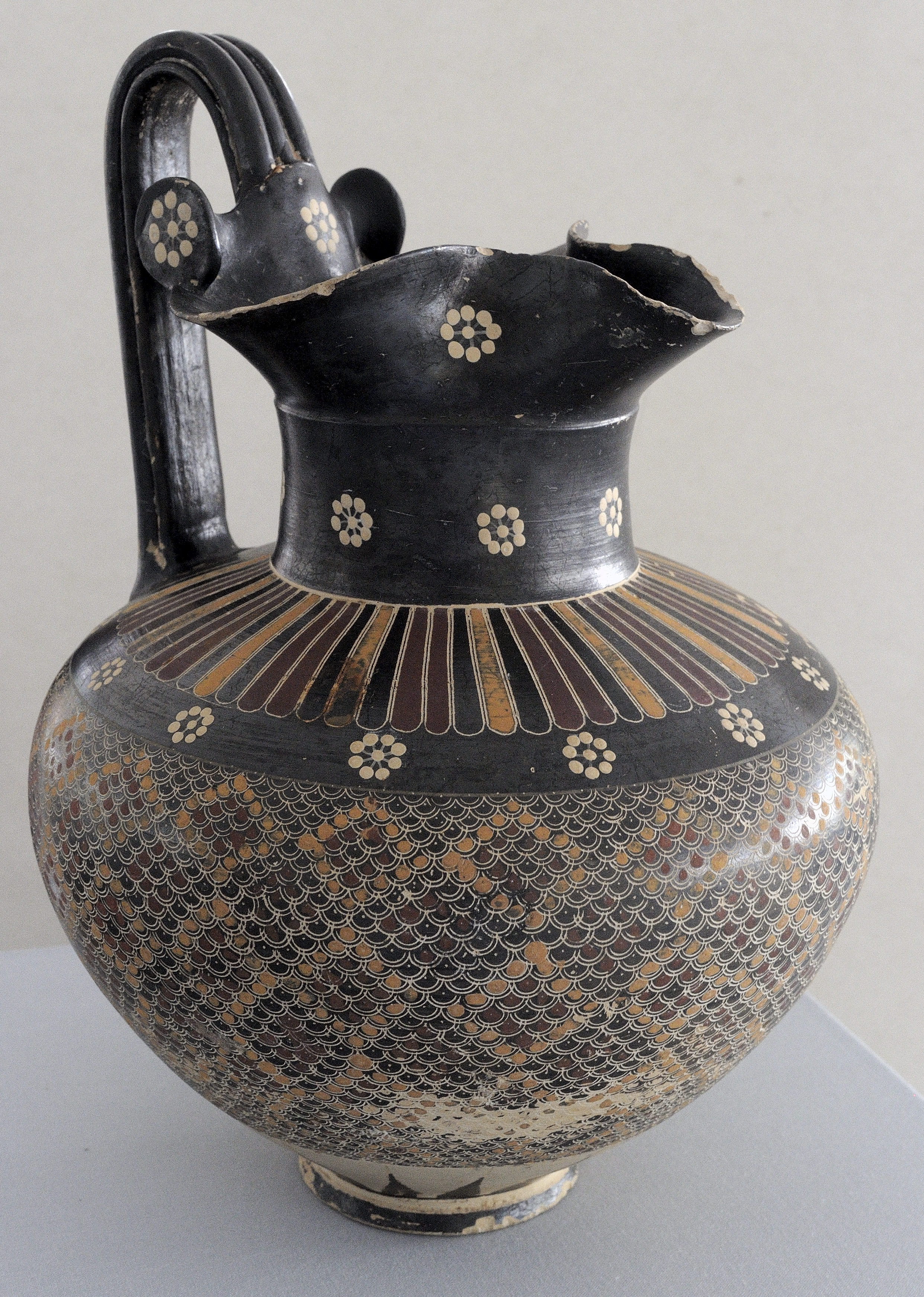 Protokorinthische Oinochoe im Antikenmuseum der Universität Heidelberg. Inventarnummer 96/4.